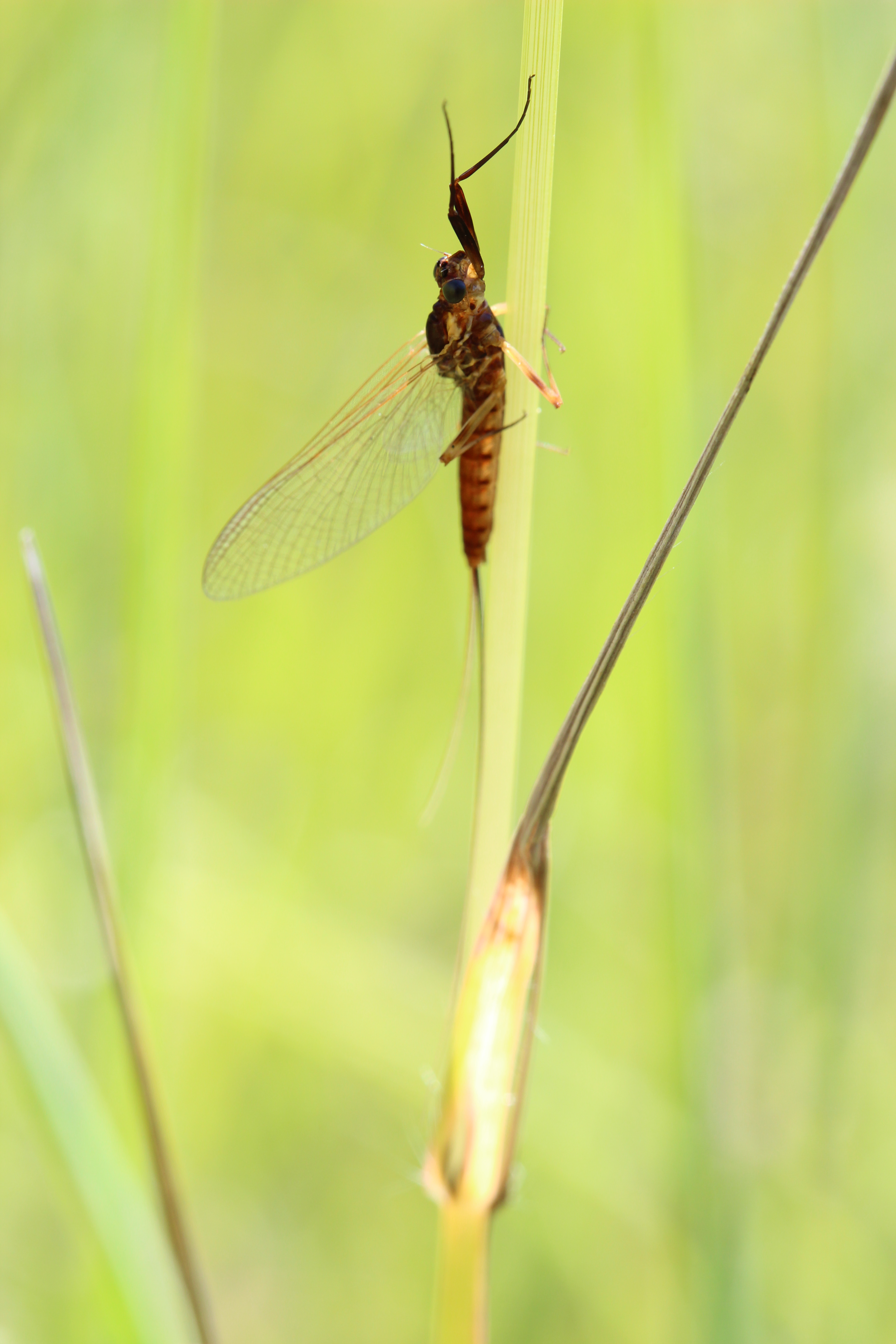 Mayfly